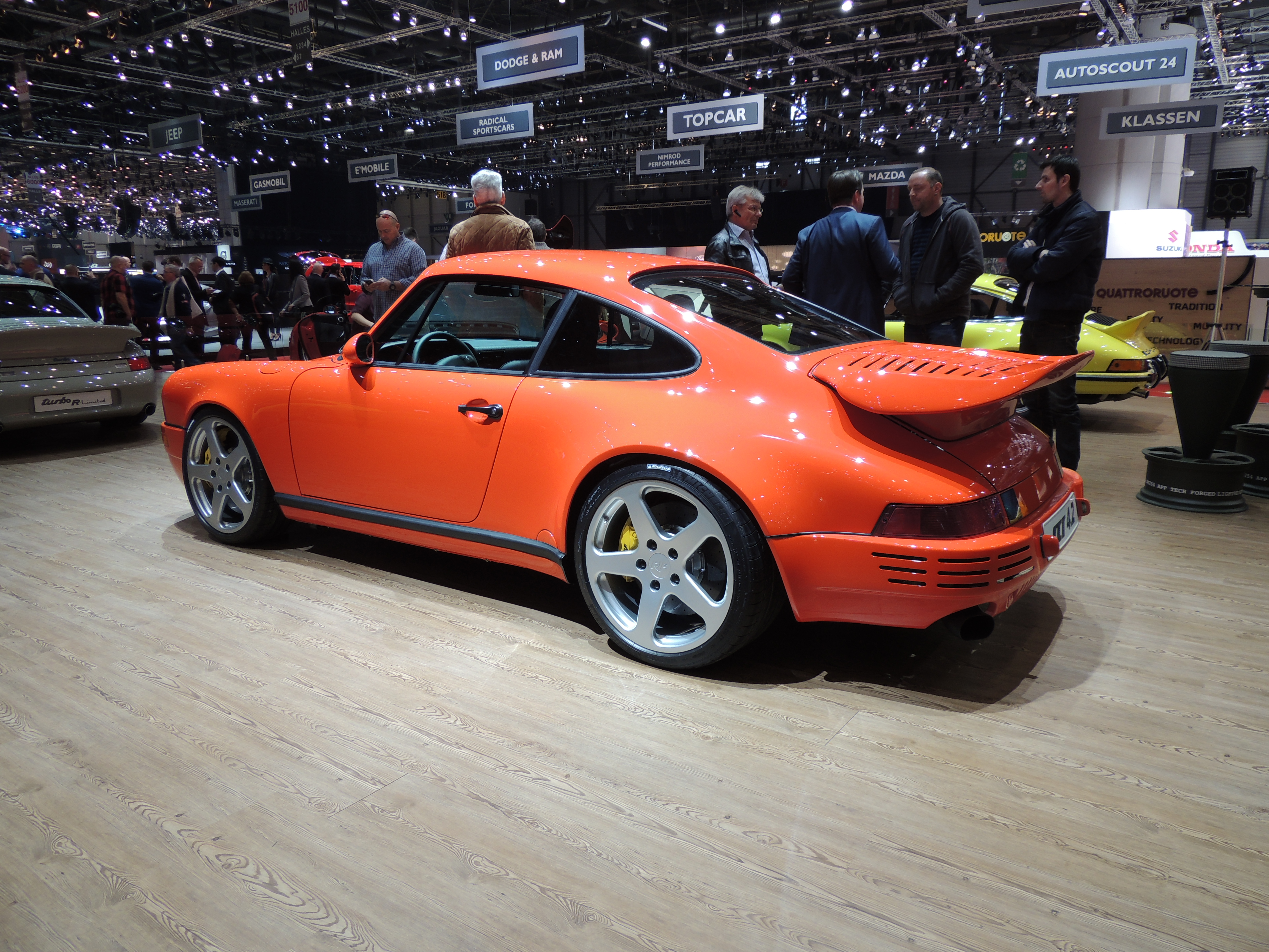 Ruf SCR 4.2 au 86è salon internationnal de l'automobile de geneve en 2016 - vue 3/4 arrière